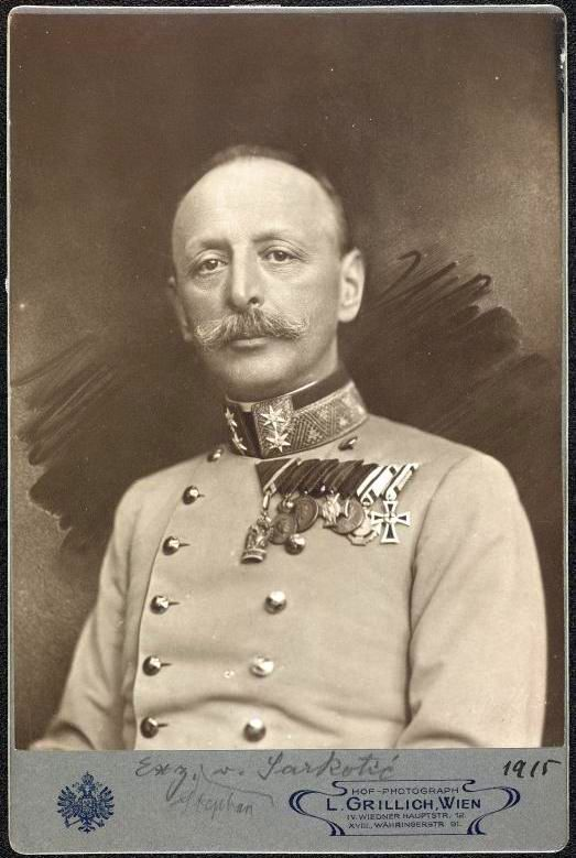 Foto von Stefan Sarkotic von Lovcen (1858-1939) in Uniform als Feldmarschallleutnant